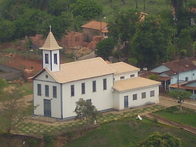 Esta é a Igreja Matriz de Santo Antônio do Rio Abaixo.